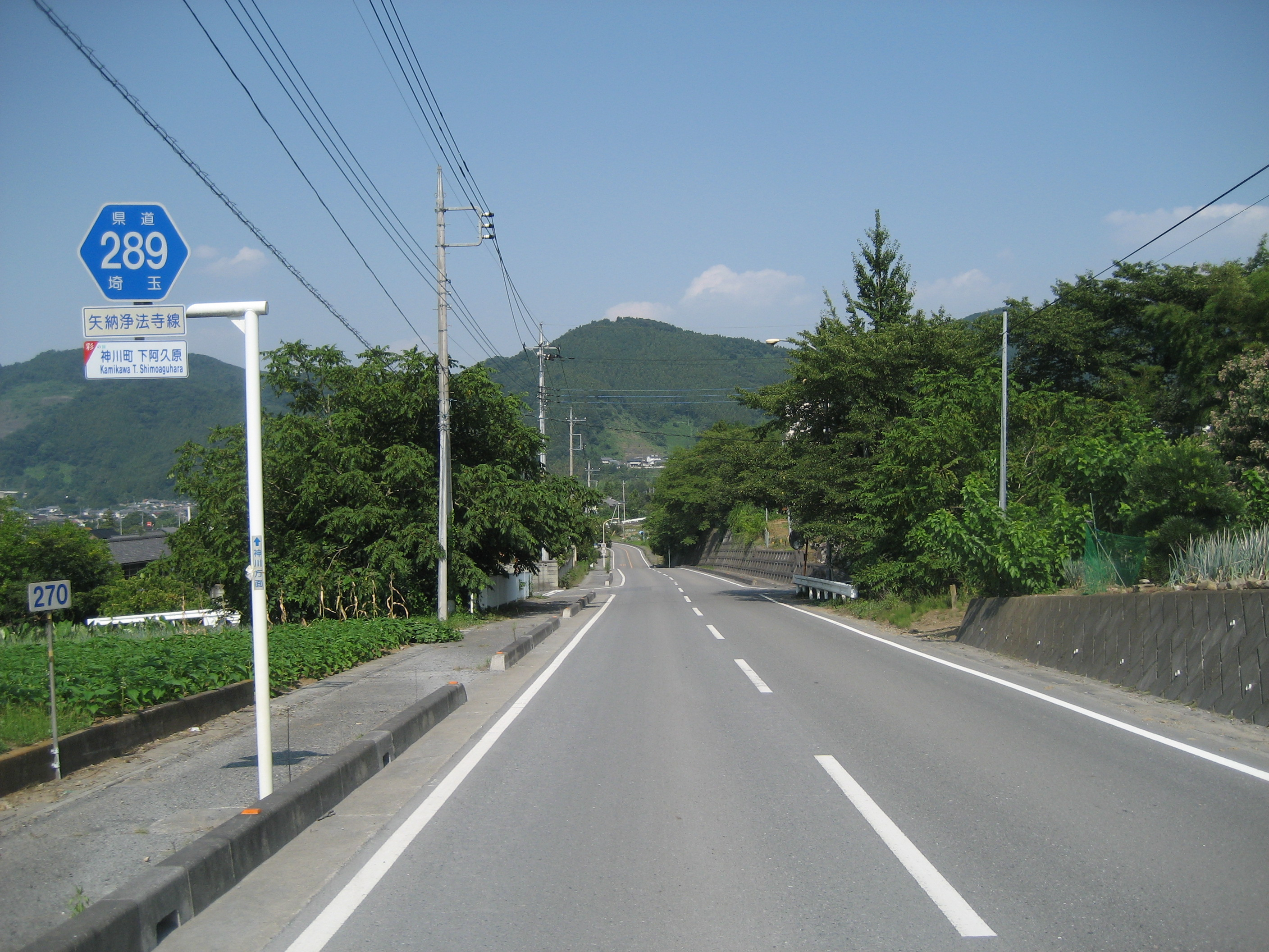 埼玉県道341号線神川町下阿久原付近